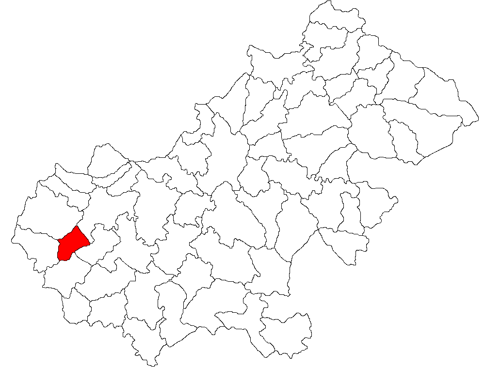 Categorie:Hărţi ale judeţului Satu Mare